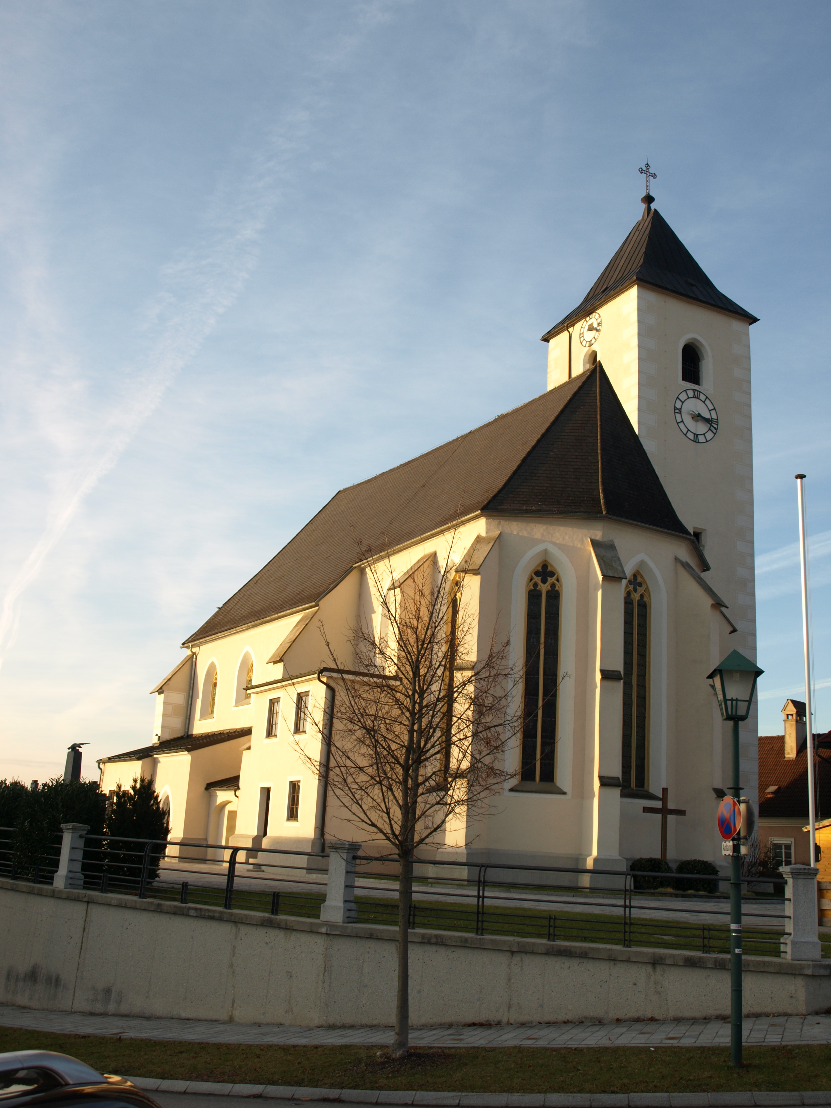 Kath. Pfarrkirche hl. Katharina